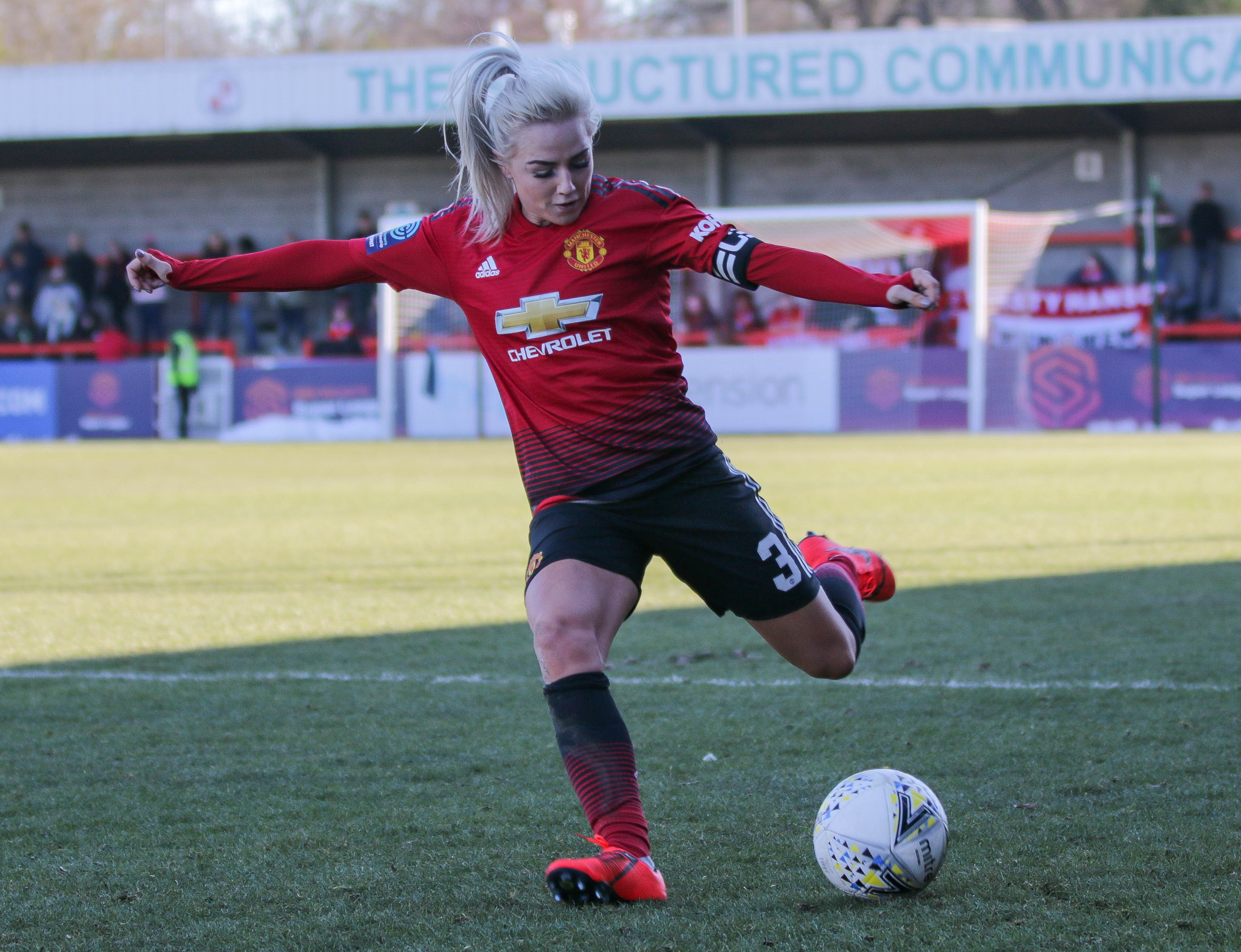 Alex Greenwood